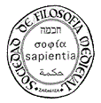 Seal of the "Sociedad de Filosofía Medieval" (Society of Medieval Philosophy)